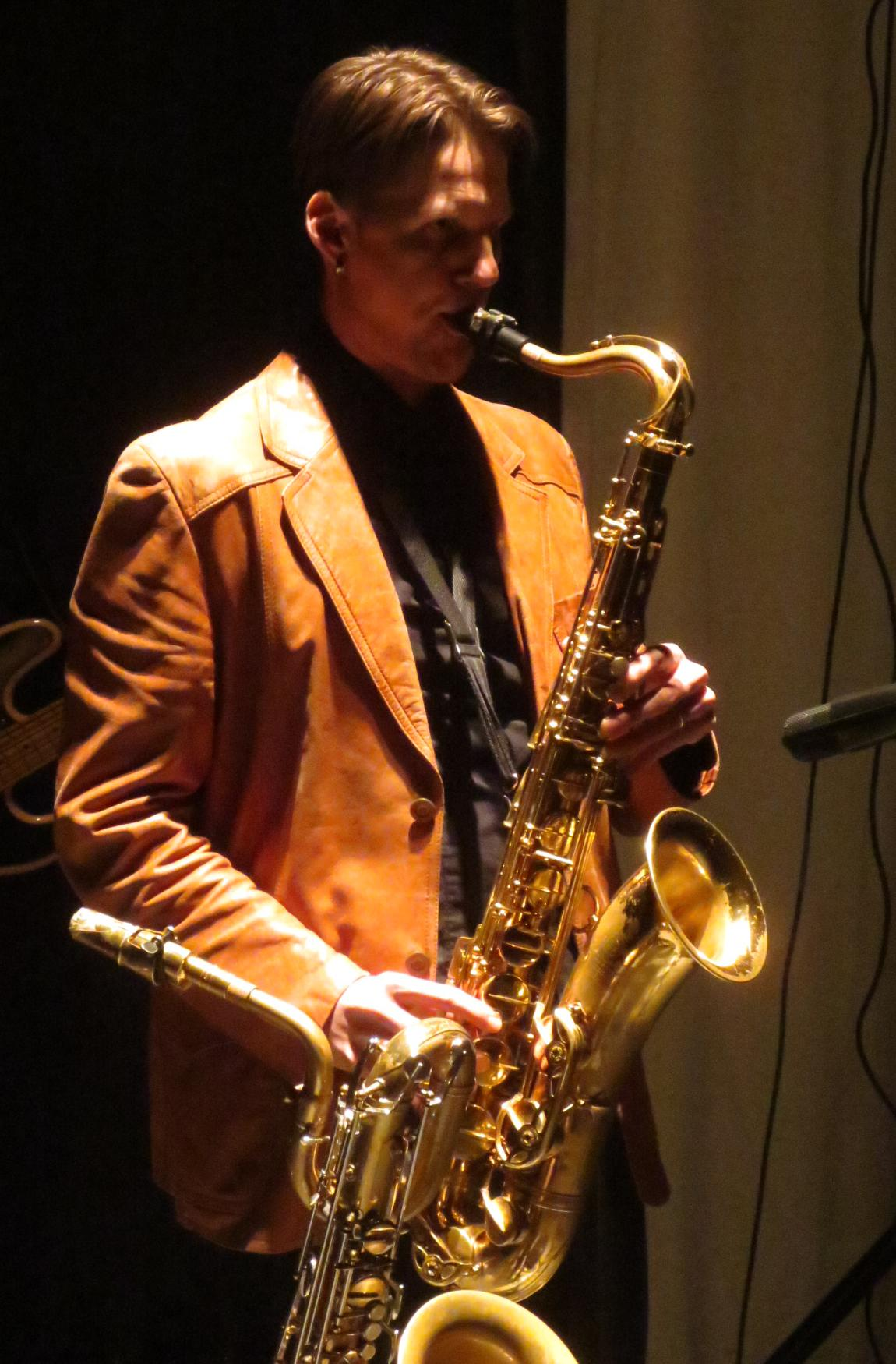 Masa Orpana, Kangasala-talolla 12.3.2015